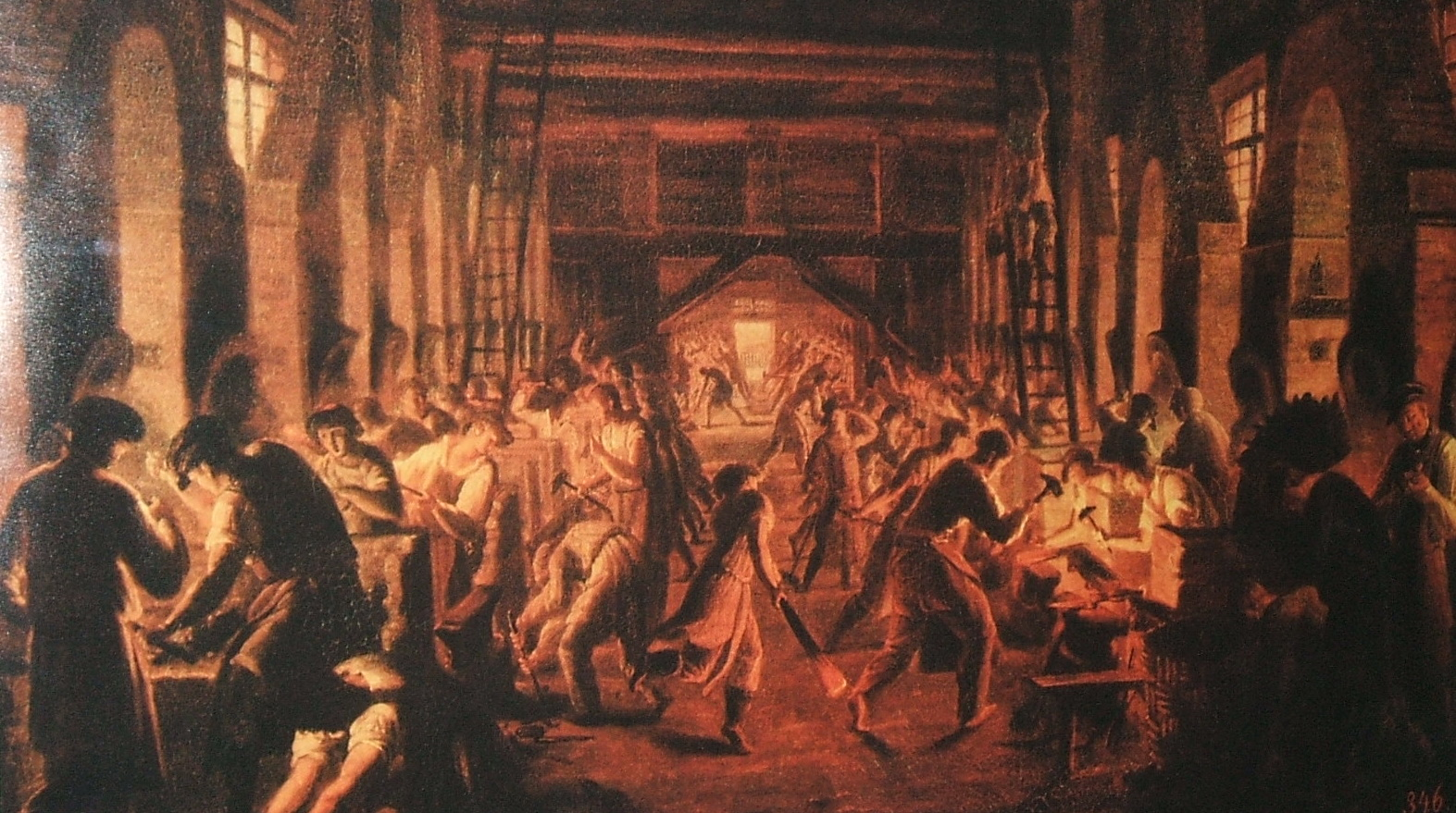 Сестрорецк СПб. Оружейный завод. Картина кузницы худ. Куртель. до 1850 года